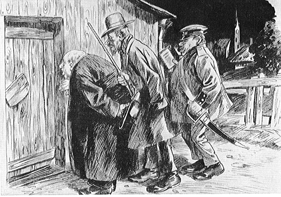 Der geheime Tanzboden: "Jetzt wollen wir aber dareinfahren unter diese verdorbene Jugend!" — "Nein, warten wir noch ein bißchen, es ist noch nicht unsittlich genug!"